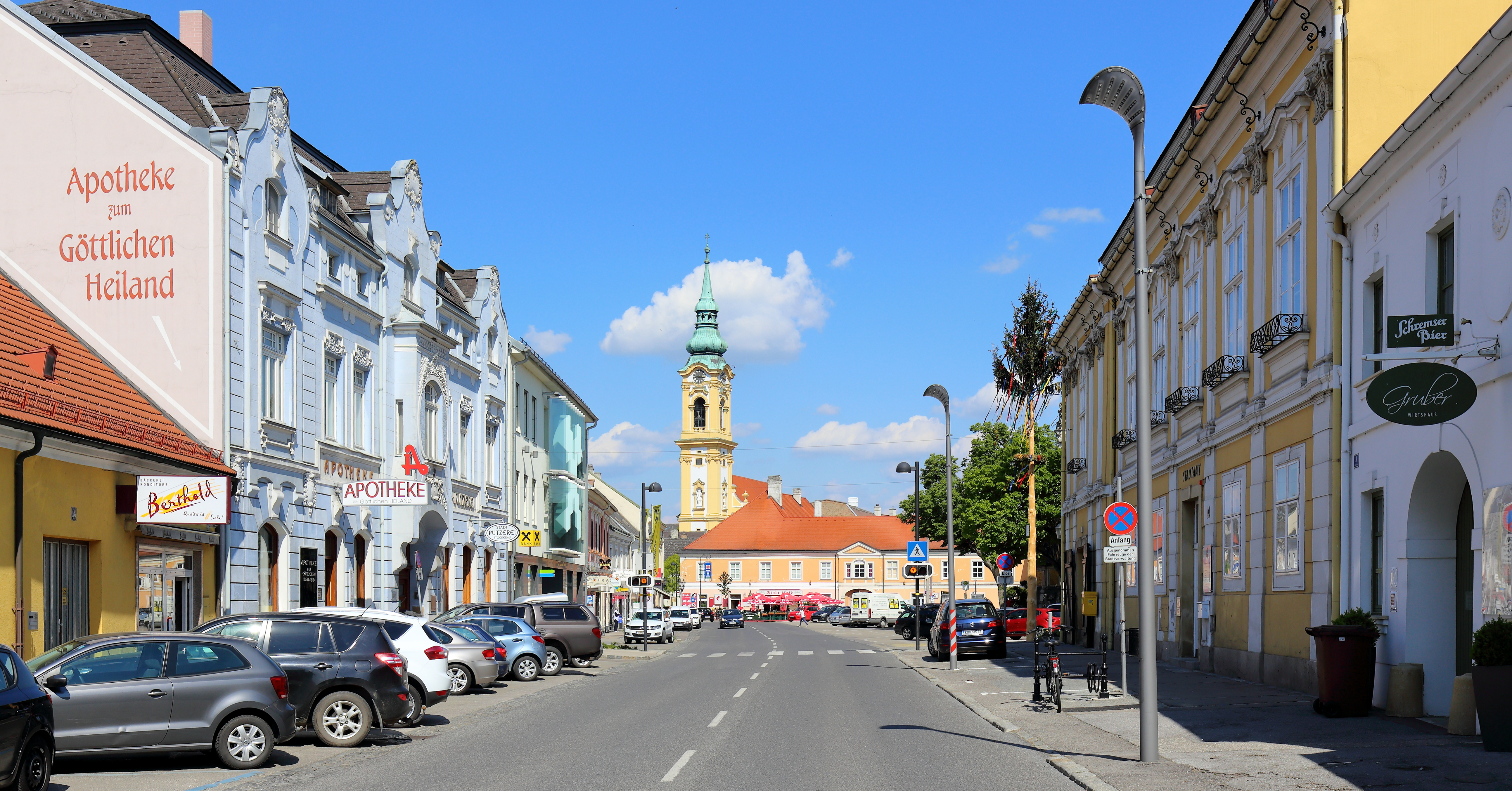 Blick von der Josef-Wolfik-Straße Richtung Rathausplatz in der niederösterreichischen Stadt Stockerau. Im Hintergrund die Stadtpfarrkirche hl. Stephan mit dem 88 m hohen stadtbildbeherrschenden Kirchturm. Links im Vordergrund ein dreigeschoßiges Geschäftshaus, welches nach 1900 durch Friedrich Kleibl im Jugendstil errichtet wurde und rechts auf gleicher Höhe der Nordflügel des Rathauses.